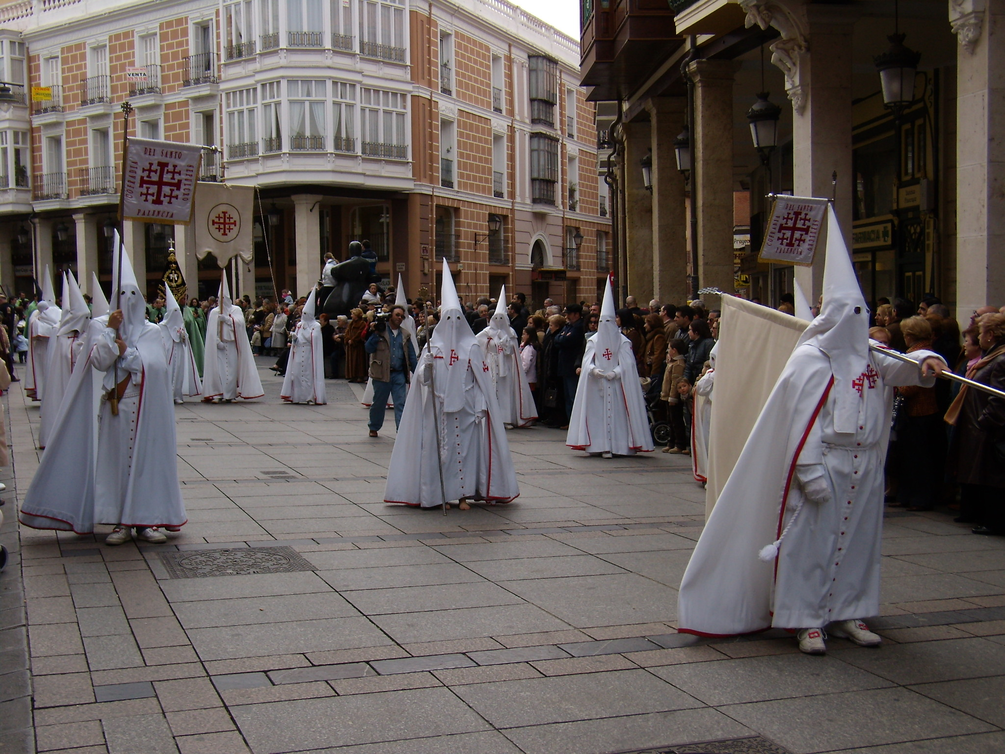 Cofradía del Santo Sepulcro. Semana Santa de Palencia.